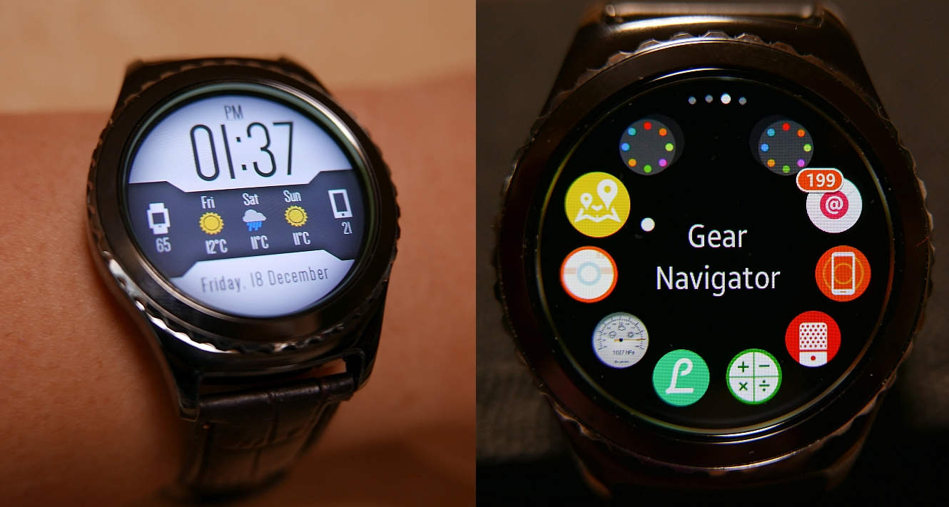 Tizen OS採用のSamsung Gear S2 Classic